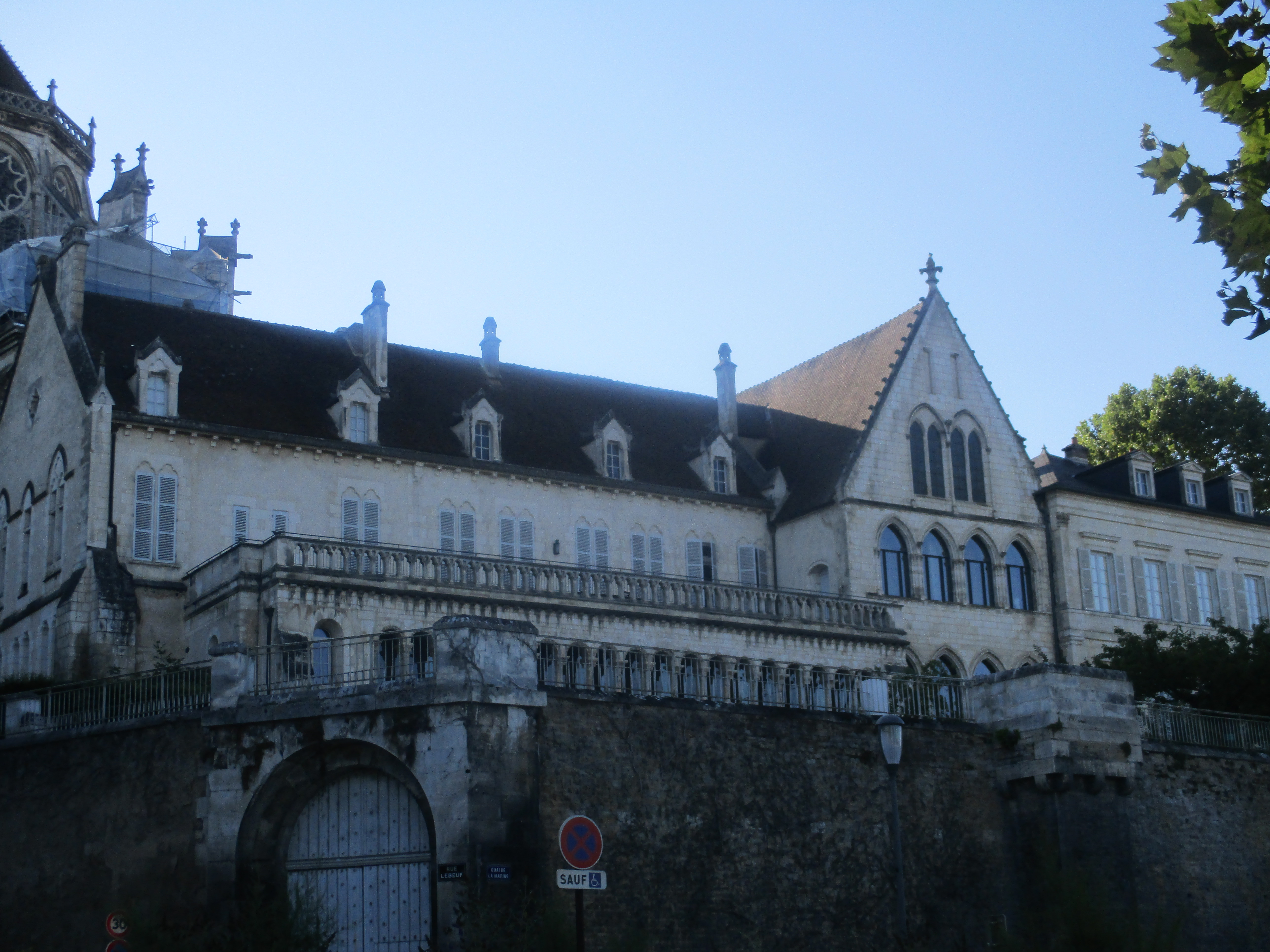 Ancien palais épiscopal d'Auxerre, coin de la rue Lebeuf et de la rue de la Marine. À gauche, la galerie romane surmontée d'une terrasse ouverte avec, à sa droite, le pignon sud de la salle synodale.